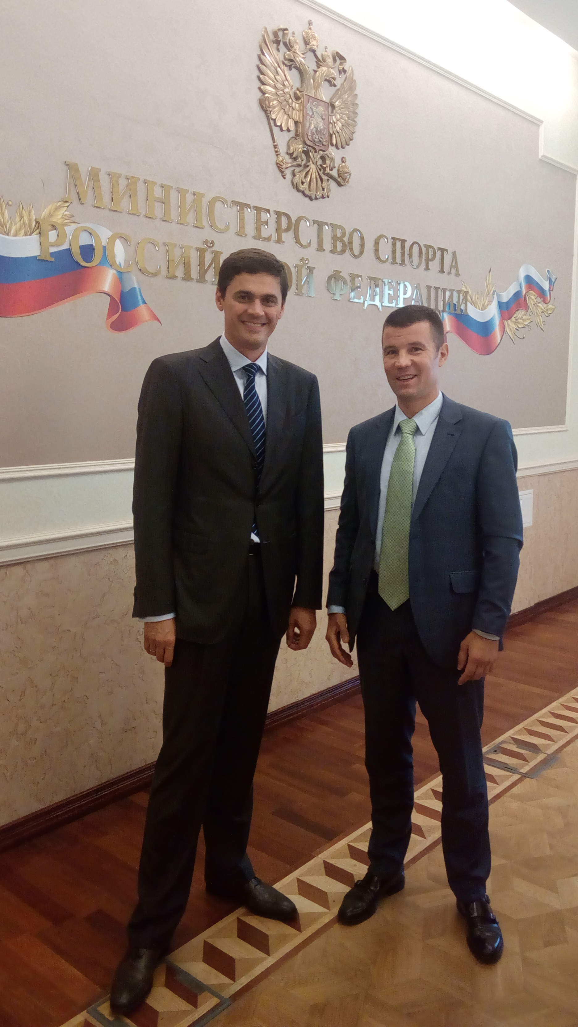 «Председатель Общественного совета Минспорта России, четырехкратный Олимпийский чемпион по плаванию А.В. Попов и председатель Комиссии по спортивному праву Общественного совета Минспорта России С.В. Алексеев»